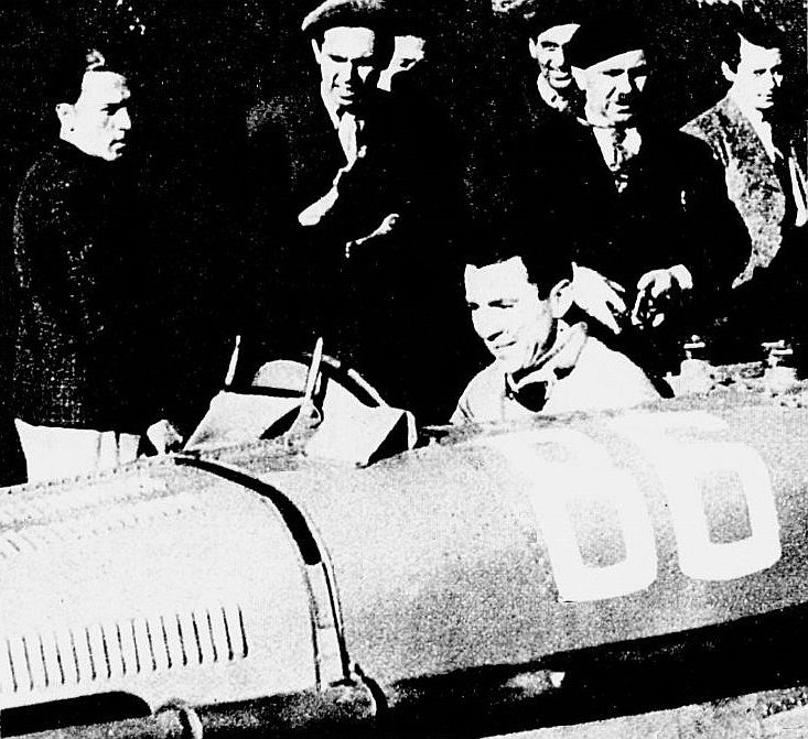 Jean-Pierre Wimille, vainqueur de la côte Nice-La Turbie en 1935 sur Bugatti 3.3 L